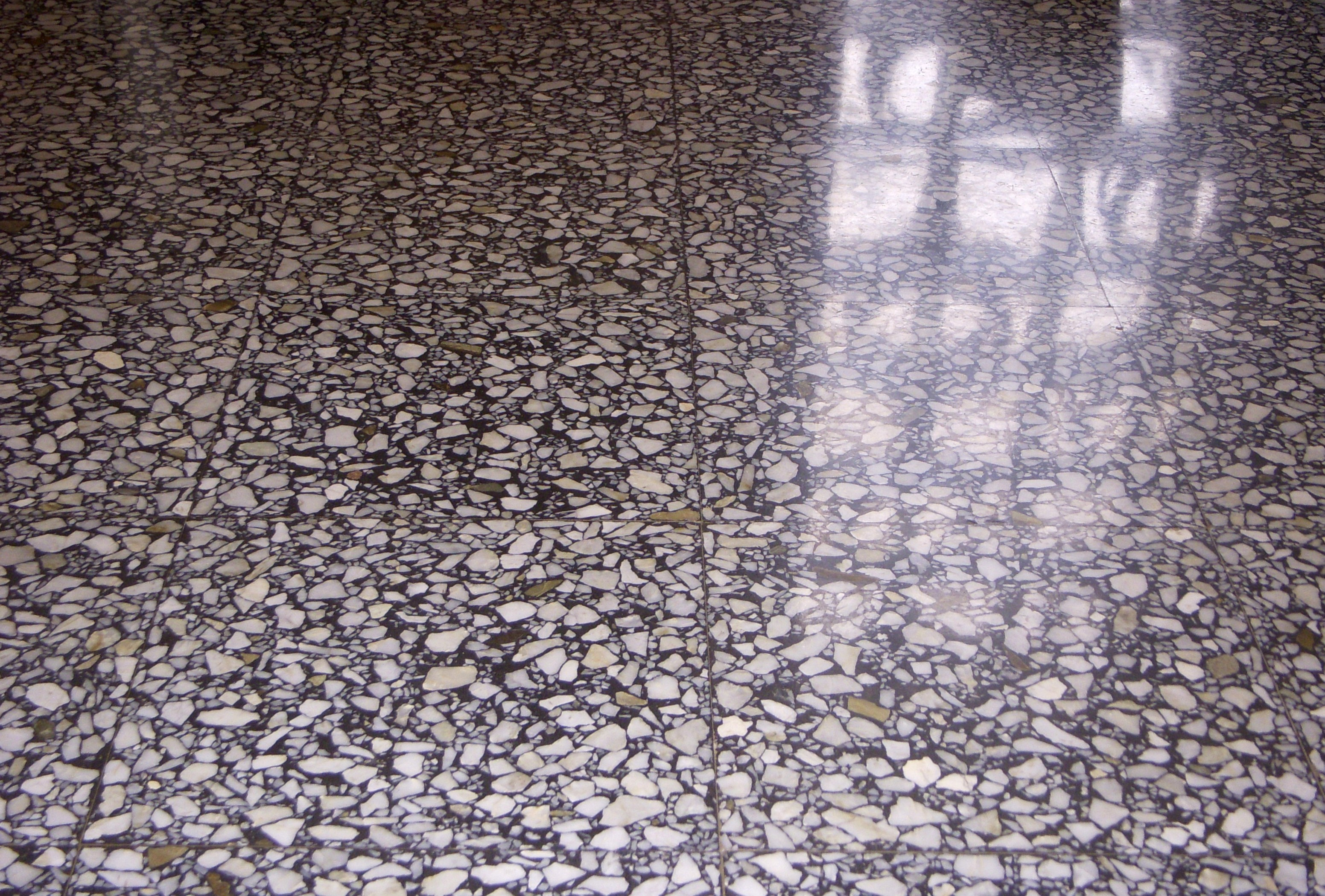 Cementmosaik (Terrazzo) plattor